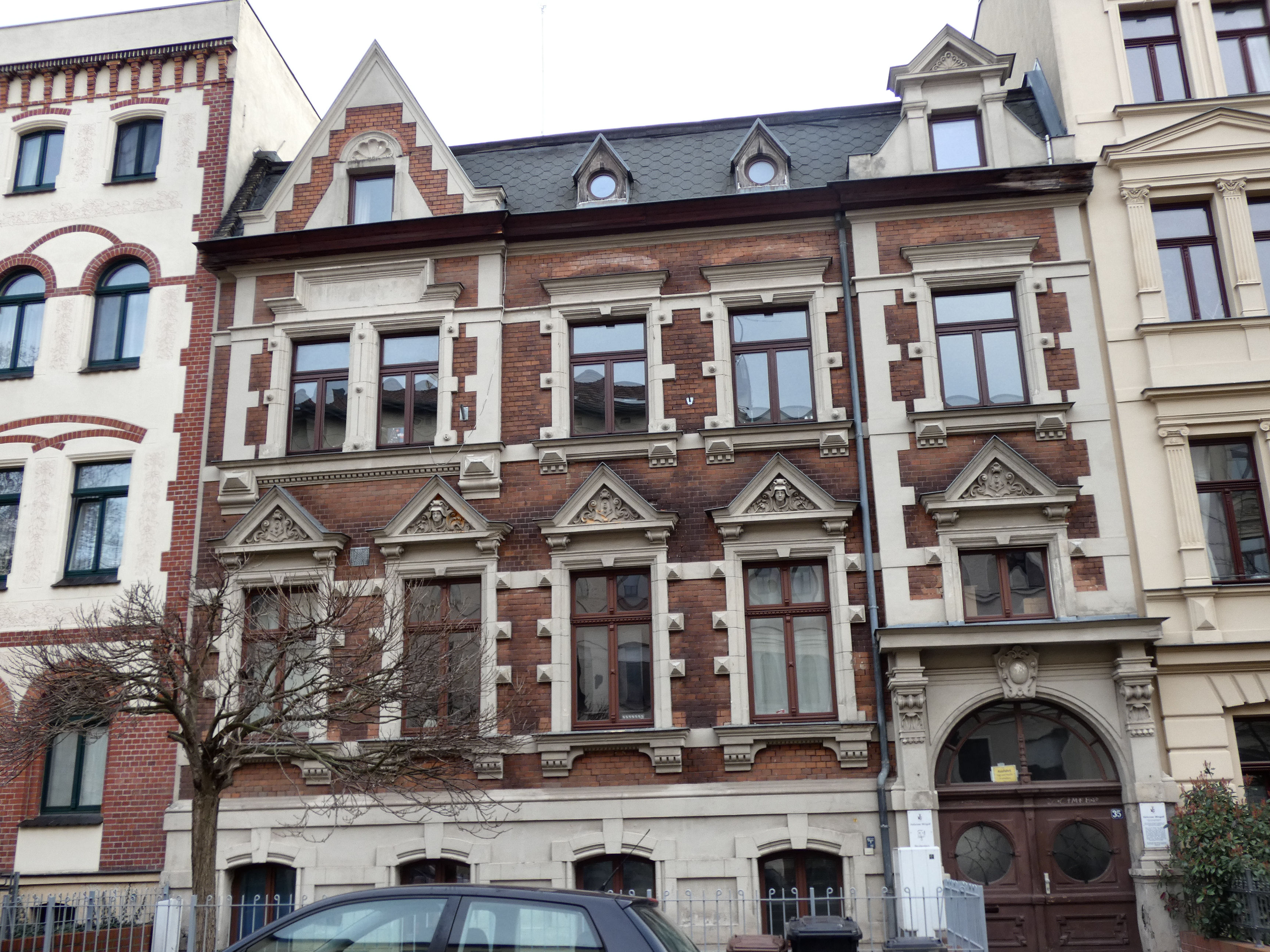 Robert-Blum-Straße 35, Verbindungshaus Hallenser Wingolf, Halle (Saale)